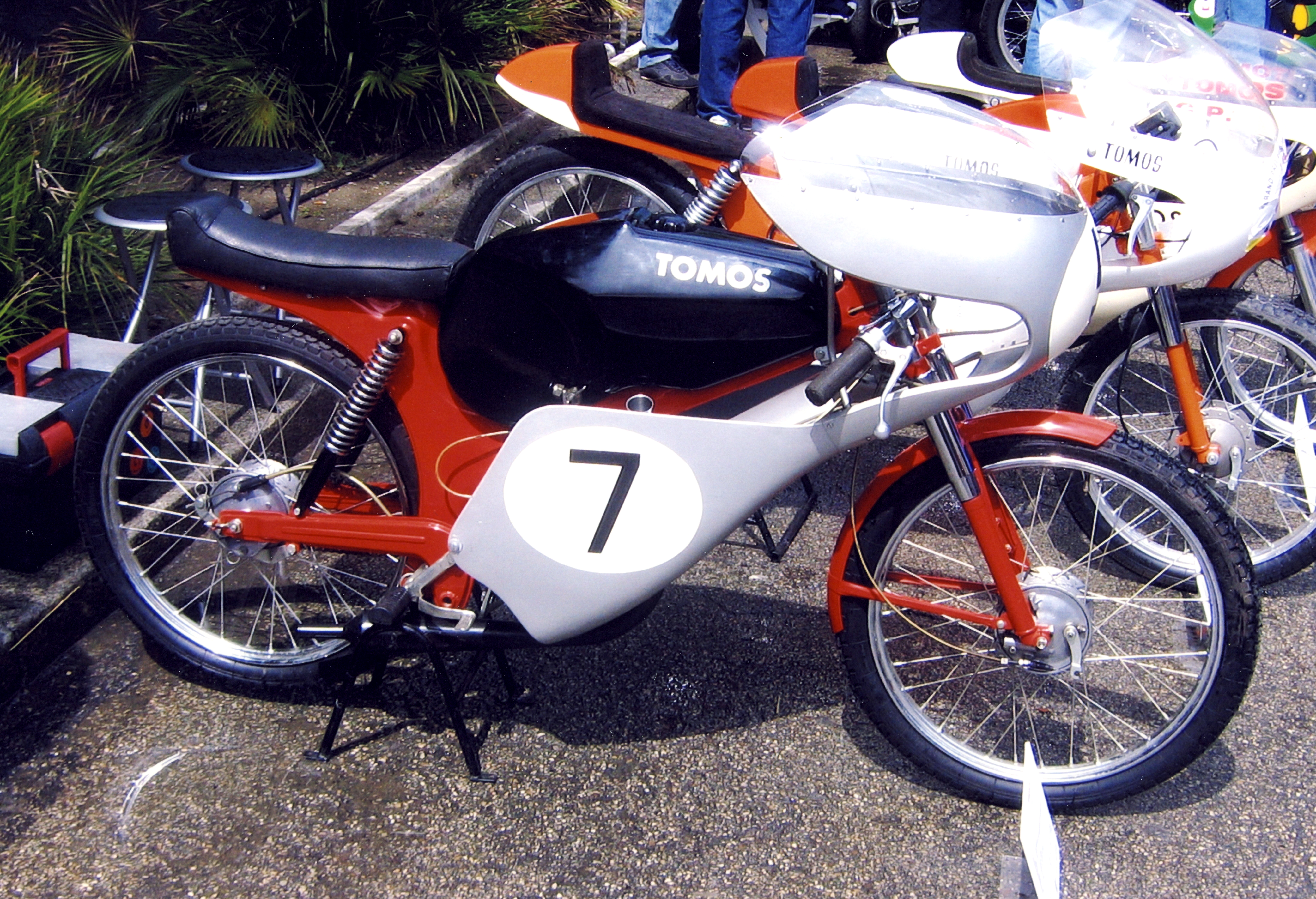 La Tomos D6S 50 GP Campione d'Italia 1969-70 con Gilberto Parlotti